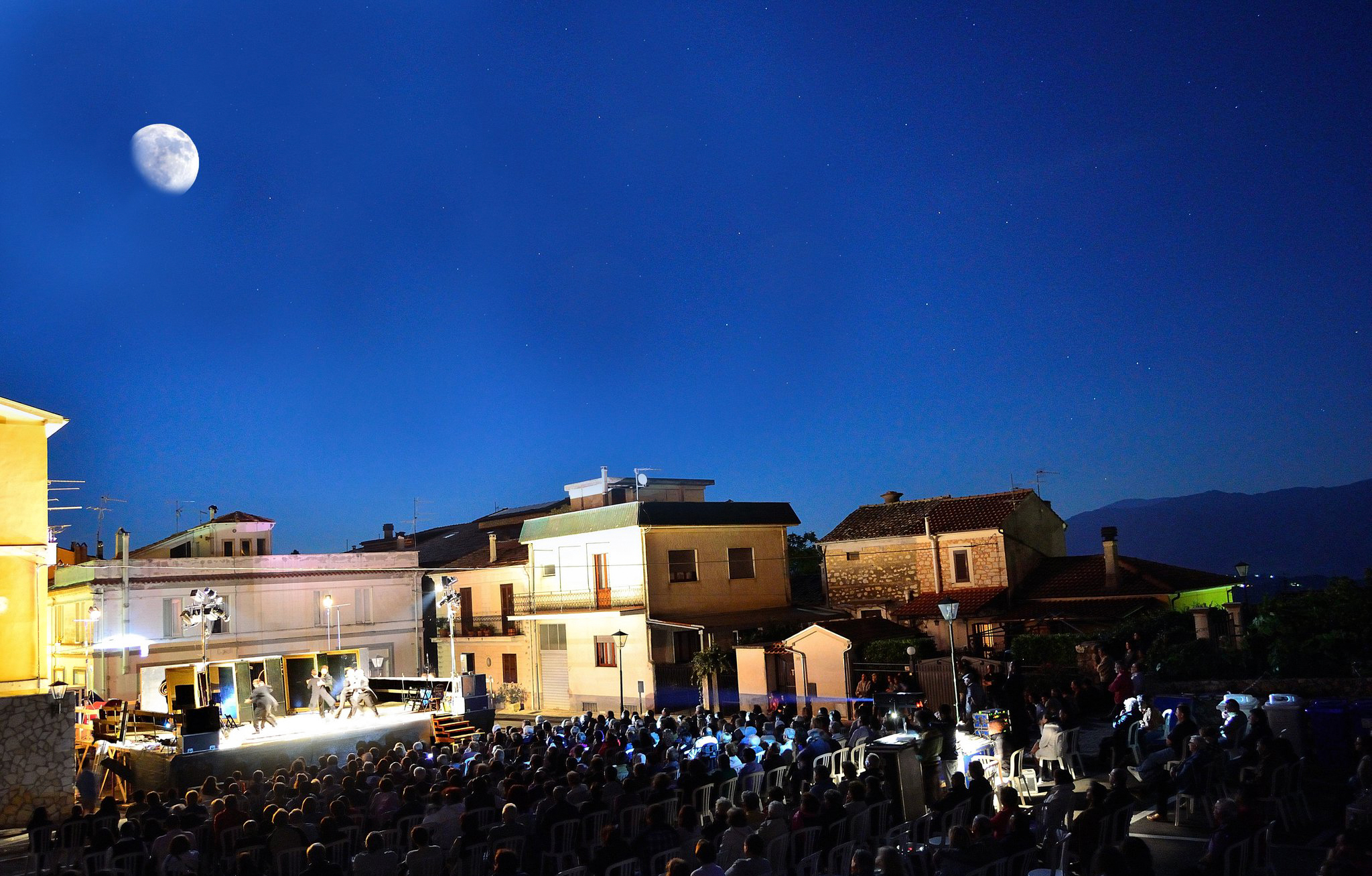 Teatro d'estate a San Donato Val di Comino